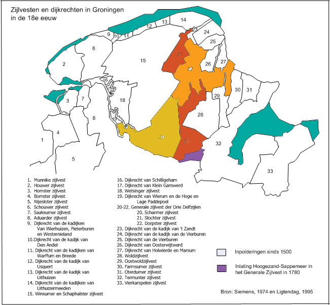 Kaart van de dijkrechten en zijlvesten in de provincie Groningen, zelf getekend op basis van kaarten in Siemens (1974) en Ligtendag (1995). Het gebied van het Generale Zijlvest der Drie Delfzijlen is hier gekleurd weergegeven. De verschillende kleuren geven aan dat er drie onderliggende zijlvesten waren binnen het Generale Zijlvest.